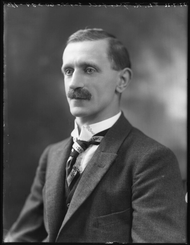 David Grenfell